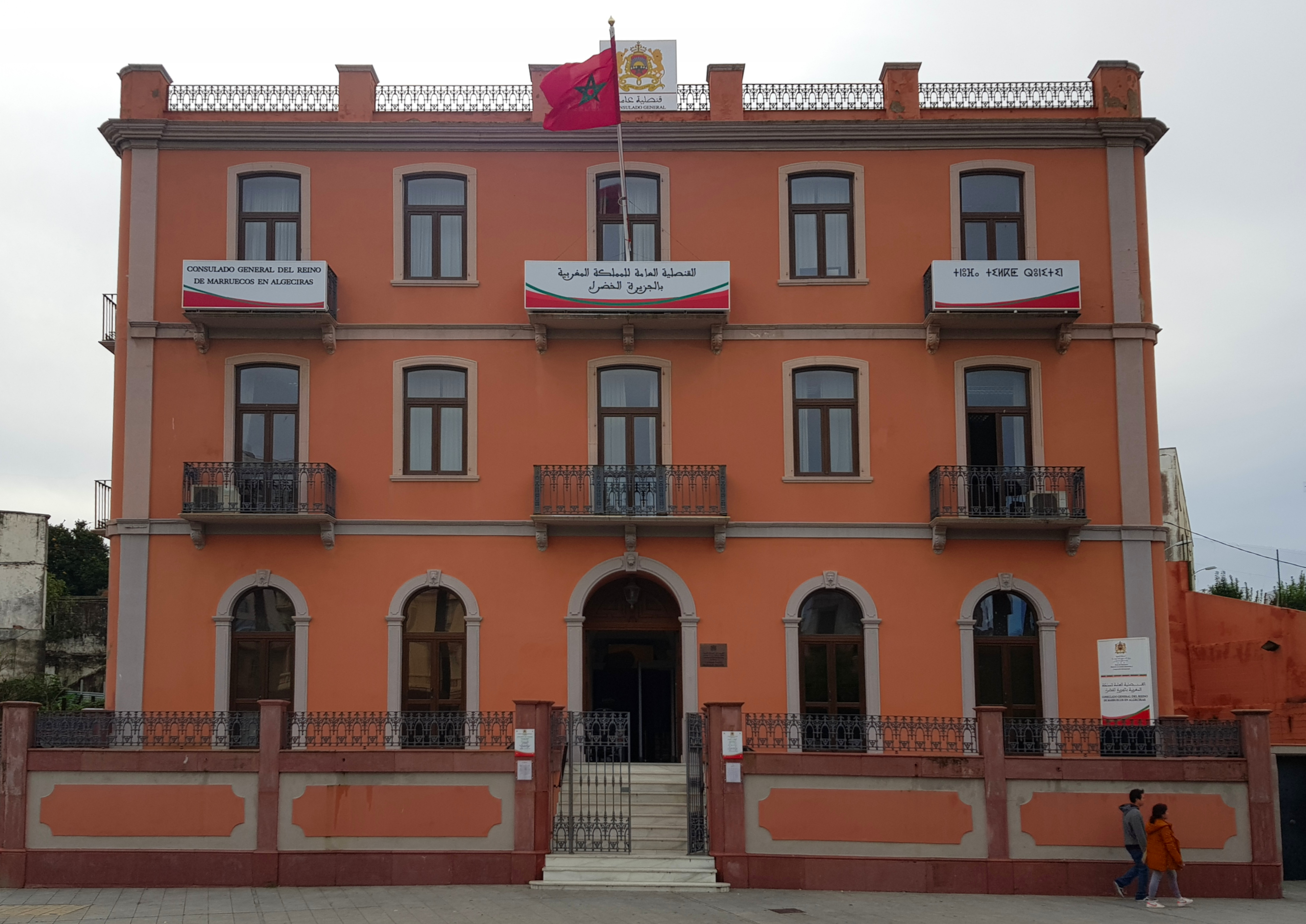 Marokkanisches Generalkonsulat im Gebäude des früheren Hotel Anglo-Hispano, Algeciras, 2018.